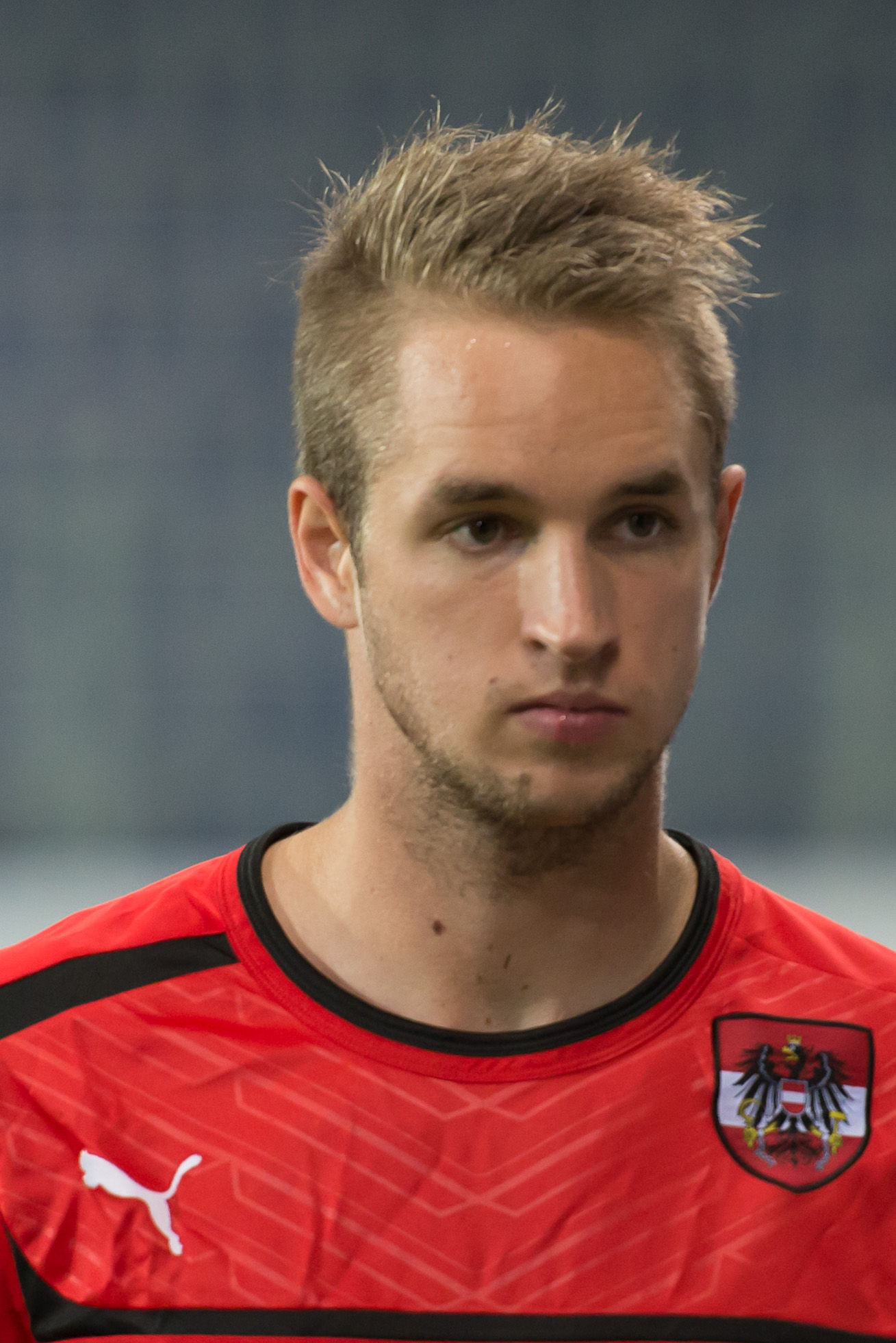 Fußball U21 EM-Qualifikation Österreich gegen Bosnien und Herzegowina St. Pölten, 5. September 2014 Marcel Ritzmaier